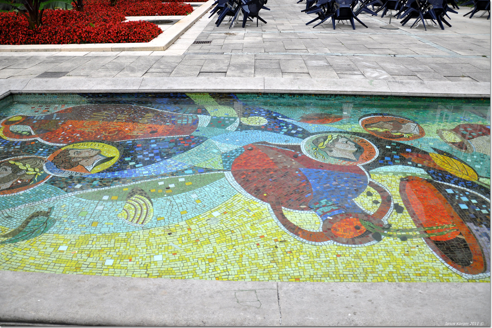 Kempten (122)